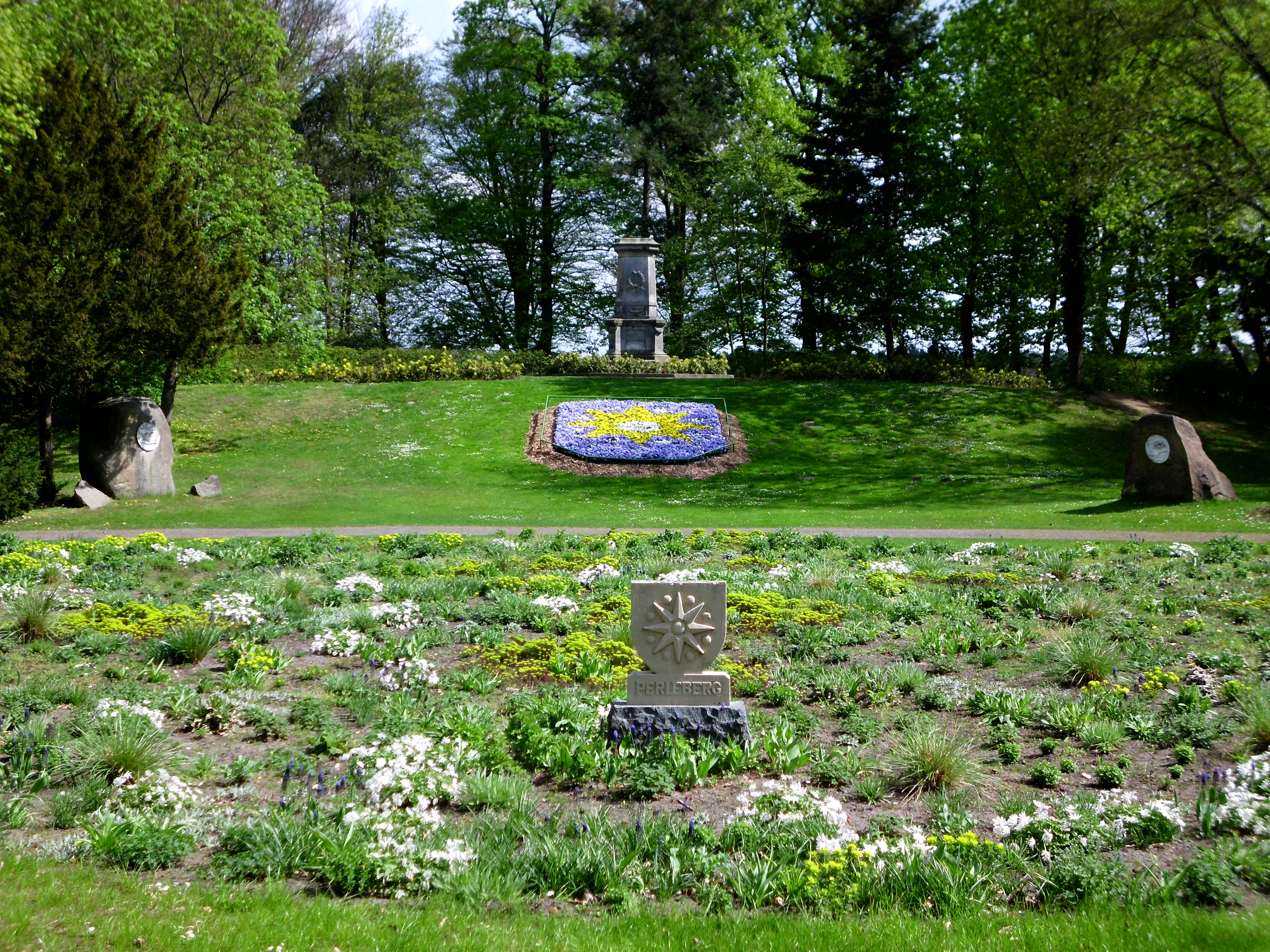 Stadtwappen aus Stiefmütterchen im Stadtpark, Perleberg